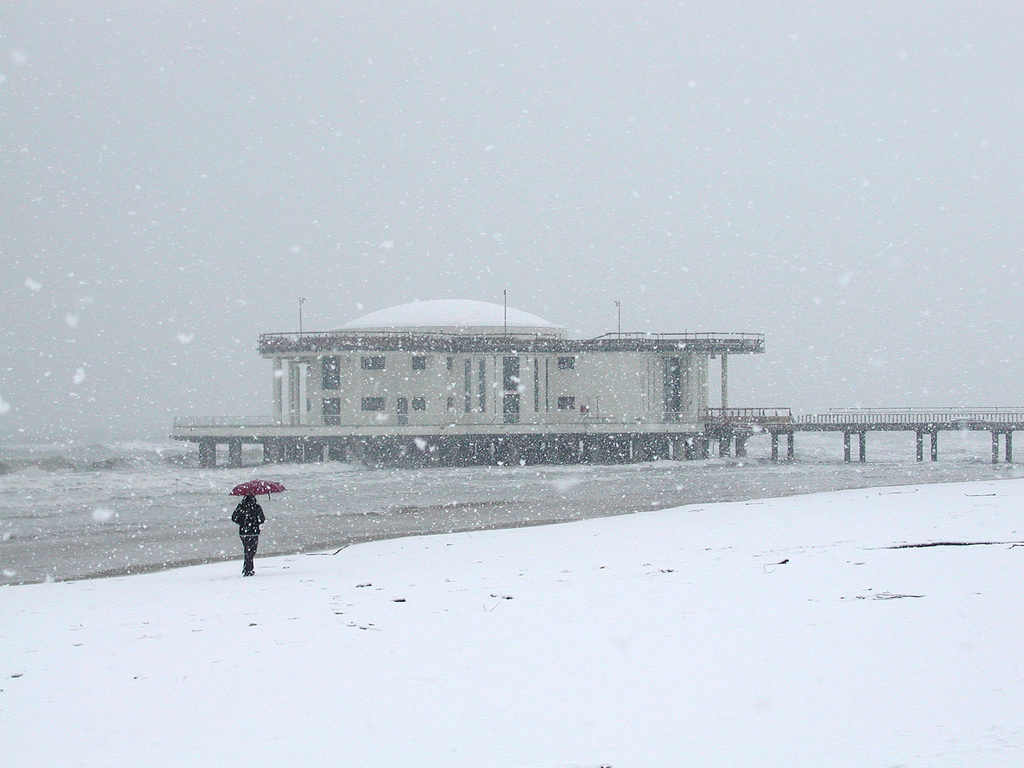 Senigallia, rotonda a mare sotto la neve. foto di Andrea Cesanelli